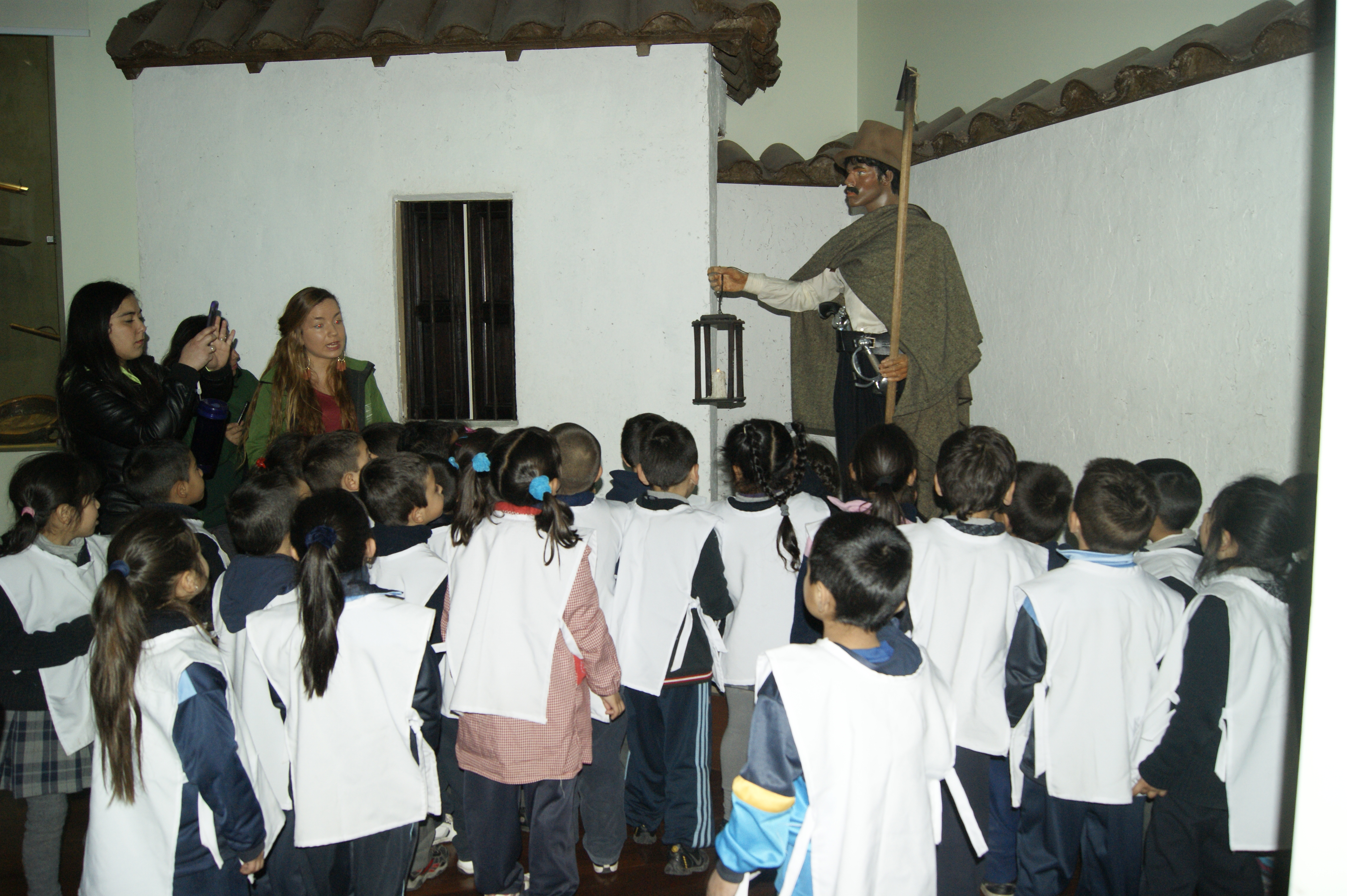 Visita guiada en el Museo Histórico Carabineros de Chile a un grupo de escolares.